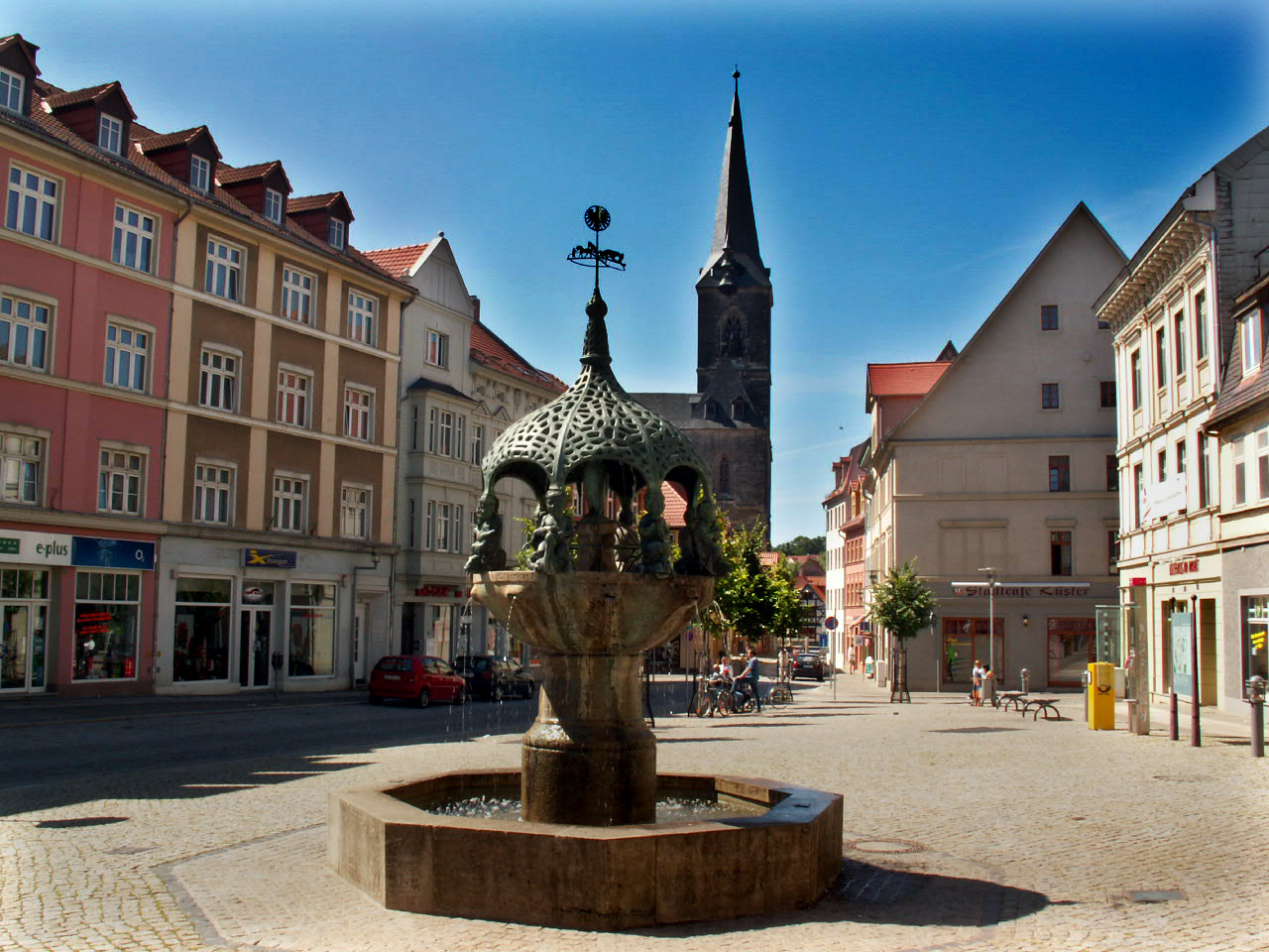 Markt von Aschersleben